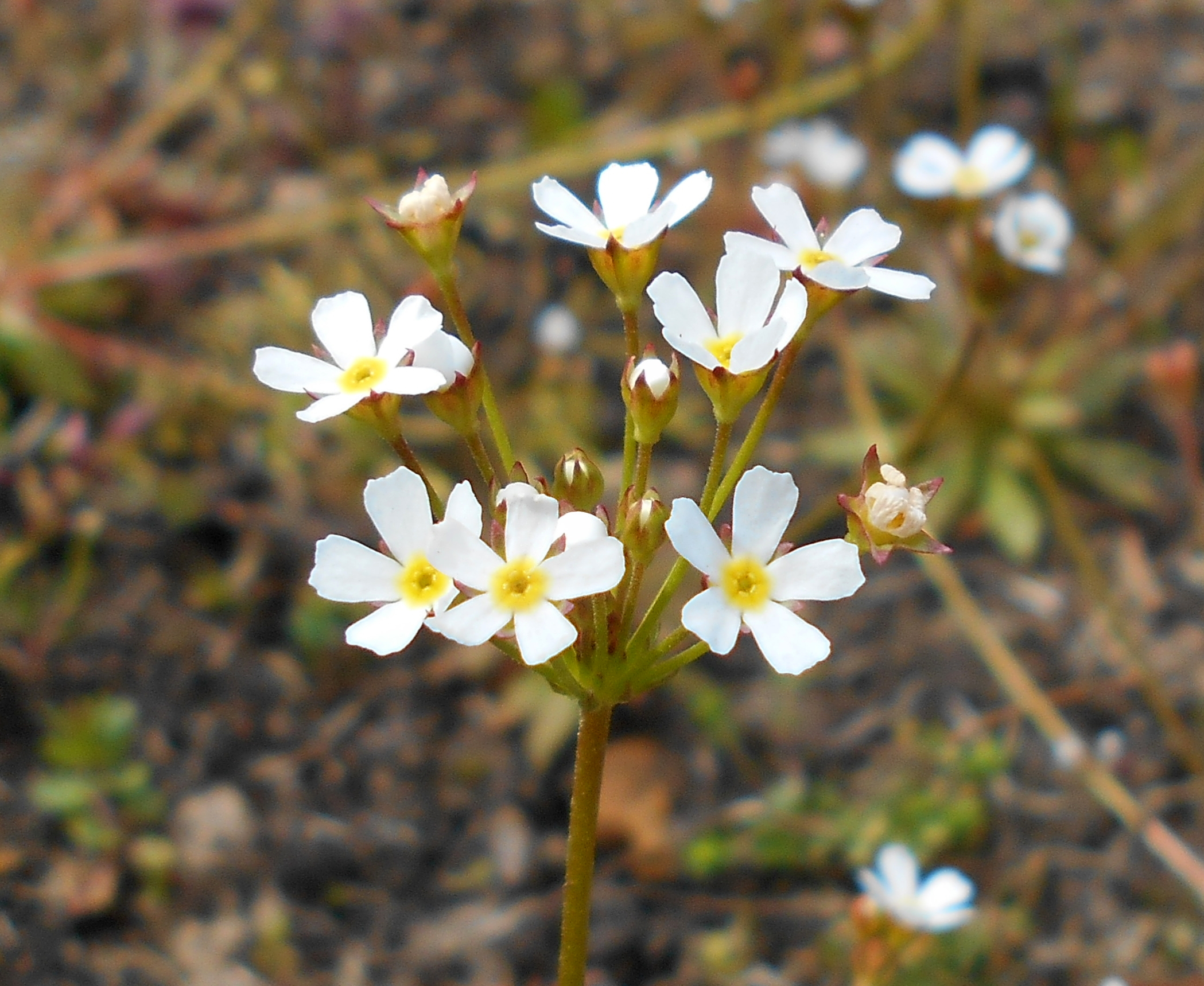 Naradka północna (Androsace septentrionalis), Ogród Botaniczny UMCS w Lublinie.